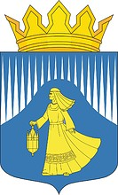 Герб Лоухского района, Карелия